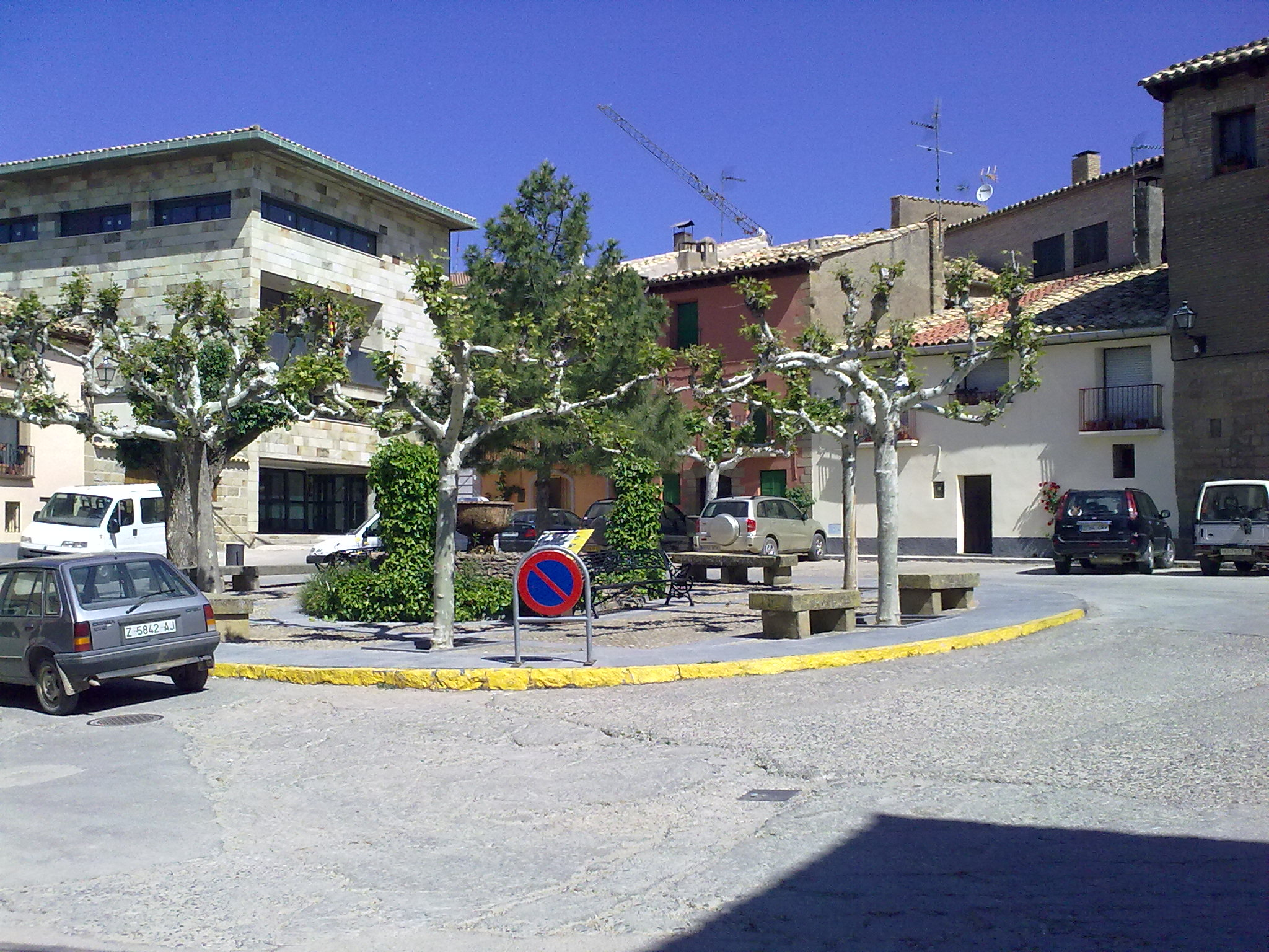 Loarre le 24 mai 2010. Espagne.